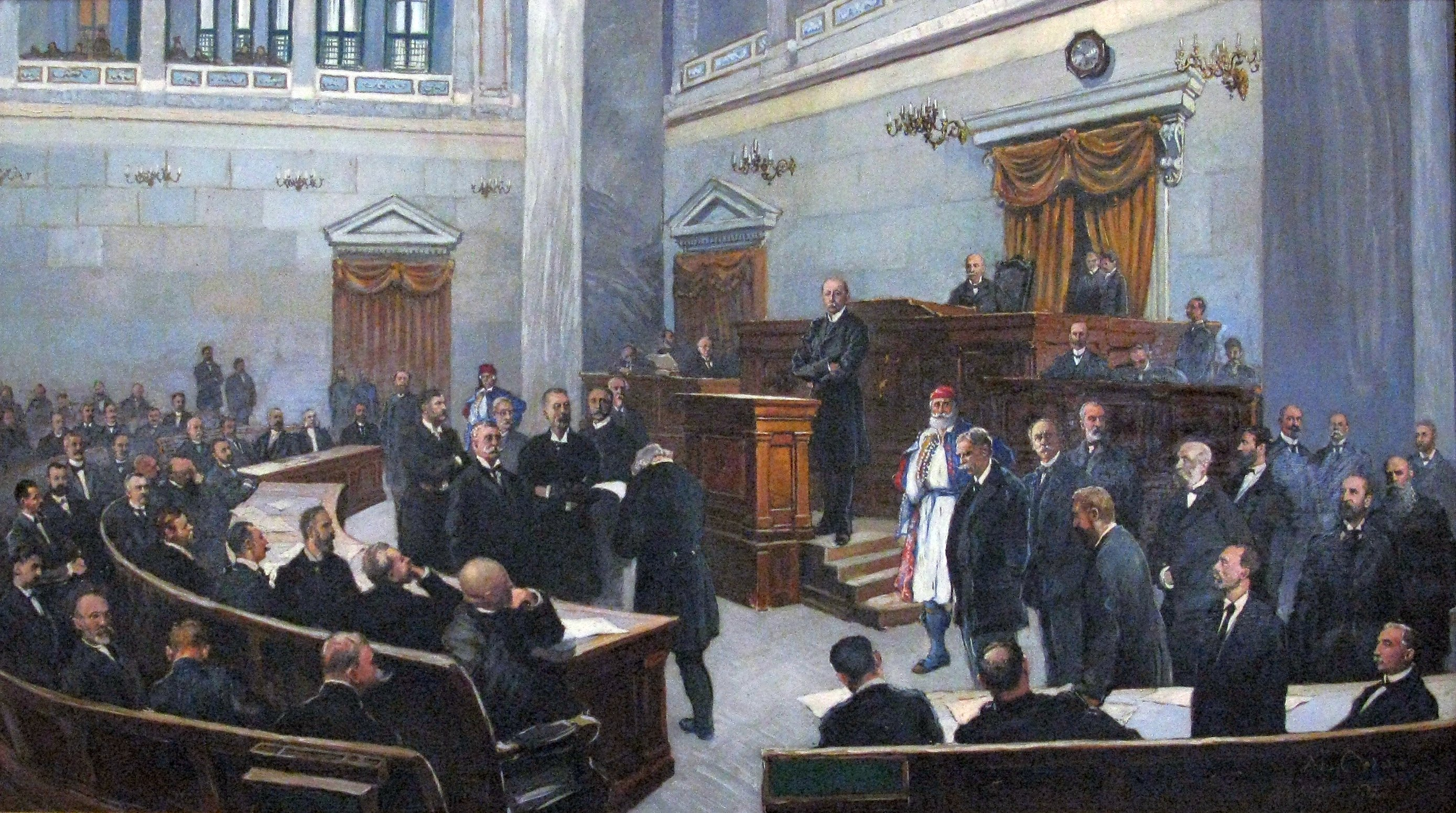 National Historical Museum, Athens, Greece --- Η Βουλή των Ελλήνων και της πολιτικής δράσεων του Χαρίλαου Τρικούπη και των άλλων πολιτικών ανδρών. Εθνικό Ιστορικό Μουσείο. Αθήνα.